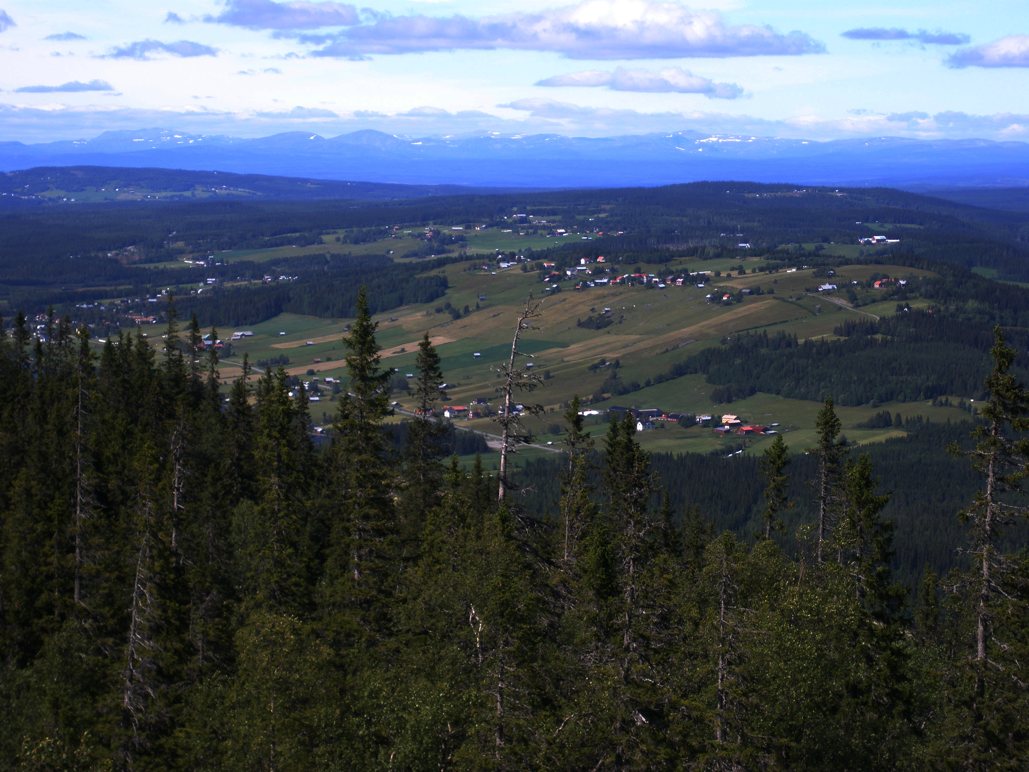 Kaxås, Offerdal, Jämtlands län, Sweden